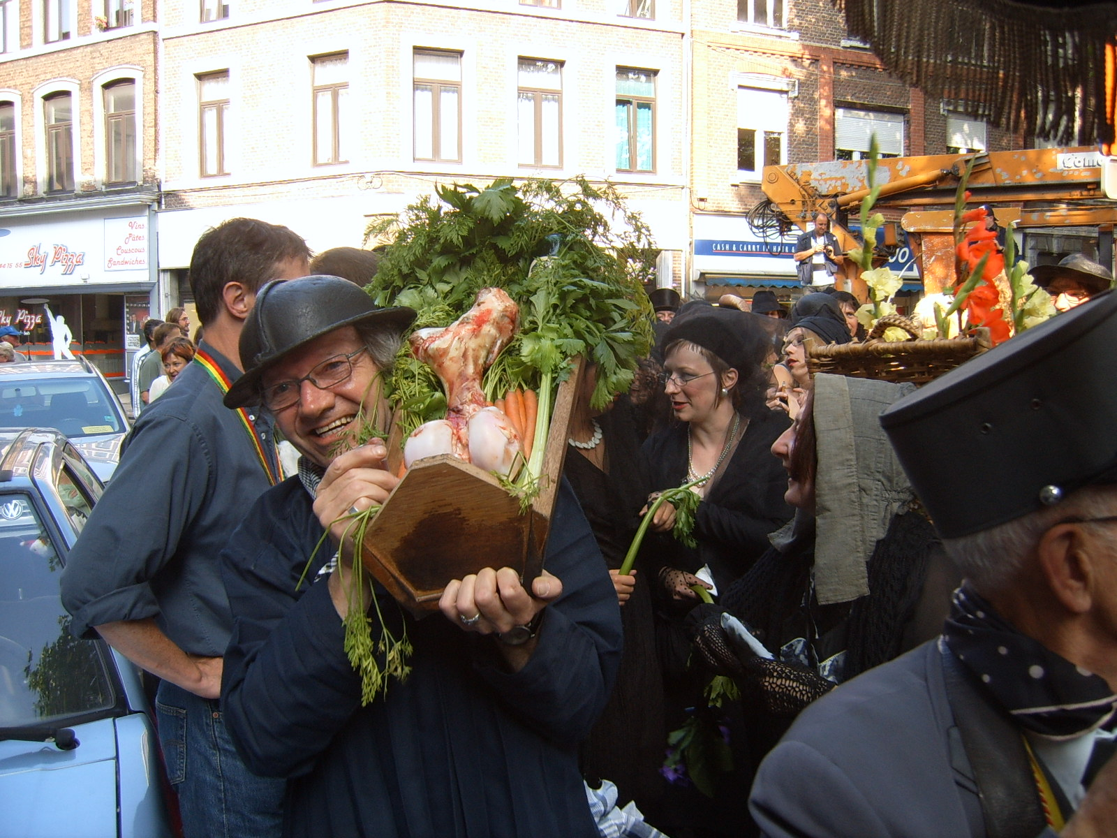 Outremeuse, Liège, 16/08/2005 Enterrement de Mati l'Ohè' : Burial of Mathew the Bone (the day after, the remains of the party...) Personal picture, I set it in public domain.